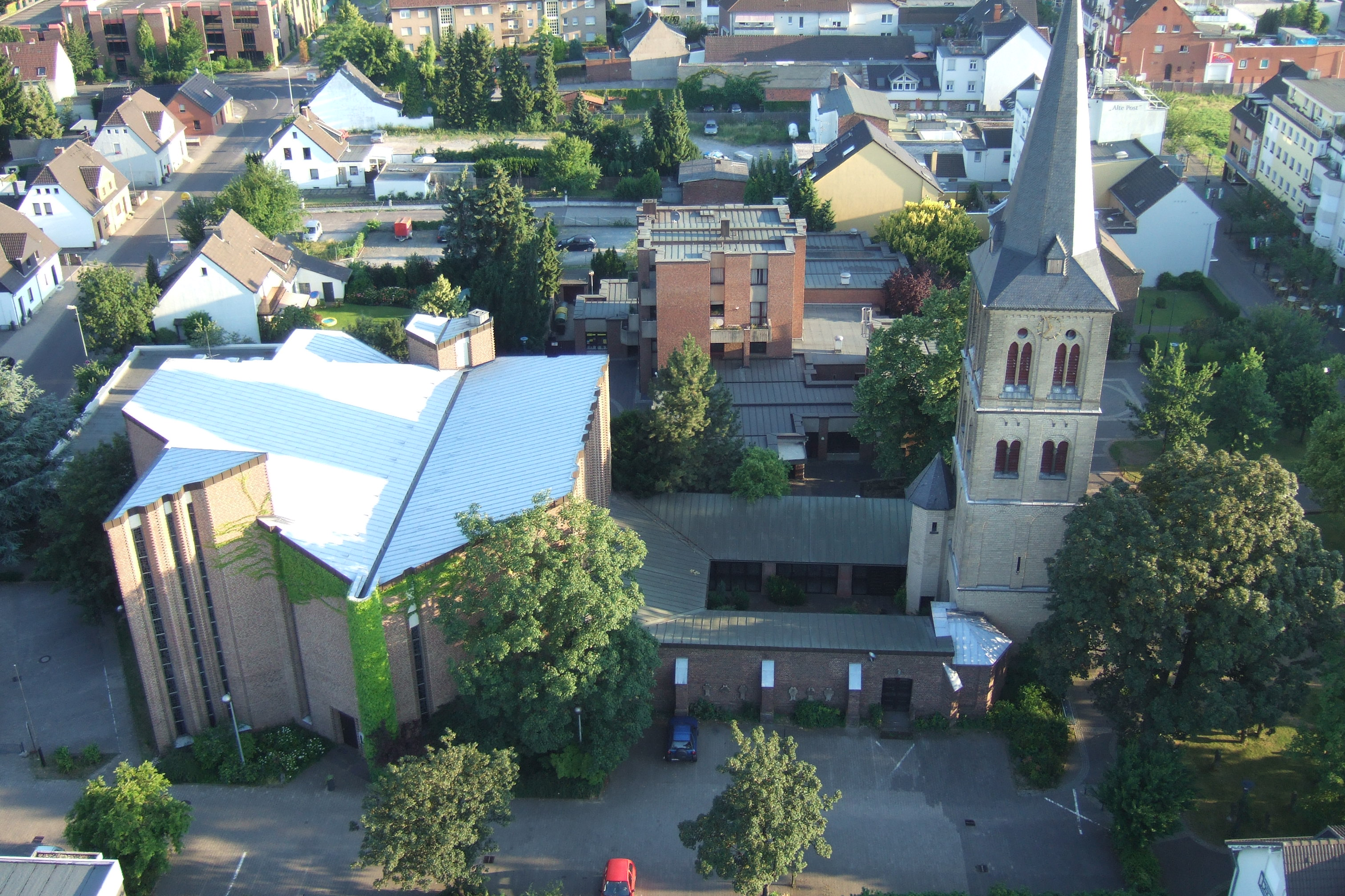 Kirche St. Michael in Dormagen (Deutschland) ; Church St. Michael in Dormagen (Germany)